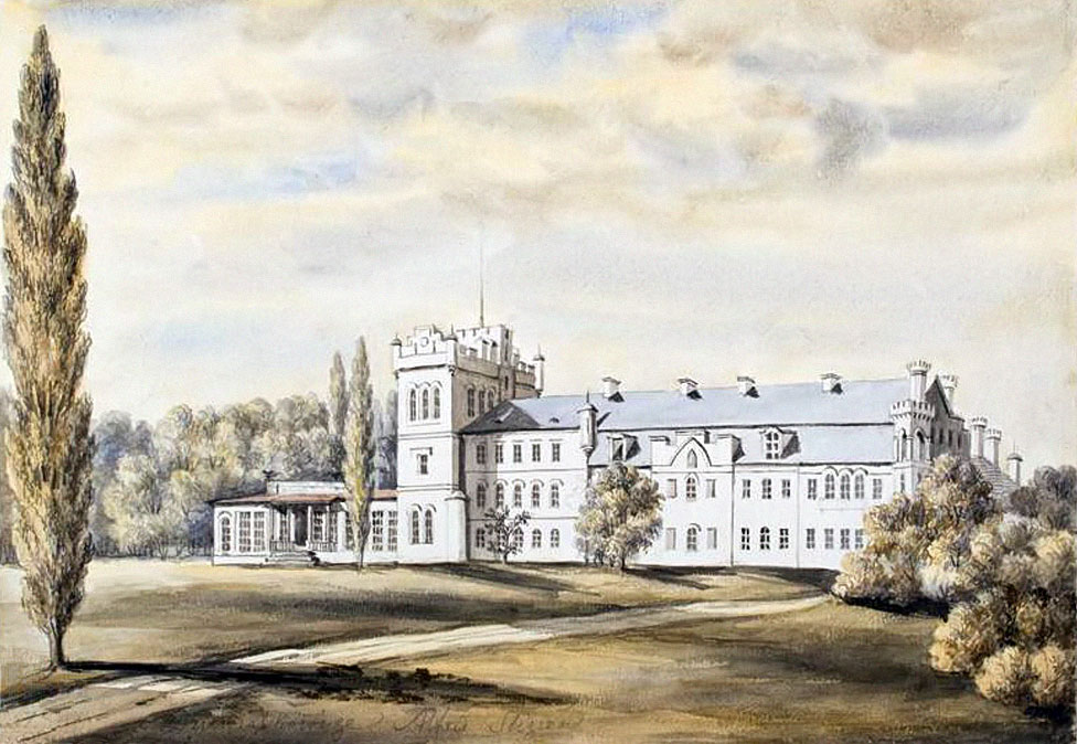 Беларуская (тарашкевіца): Дзявяткавічы (Dziaviatkavičy), сядзіба Сьлізняў (Ślizień)